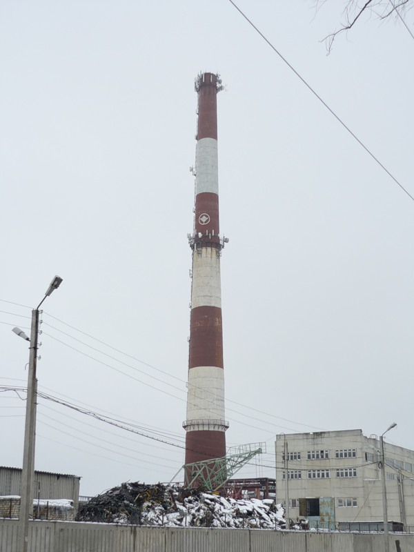 Труба завода ПАЗ